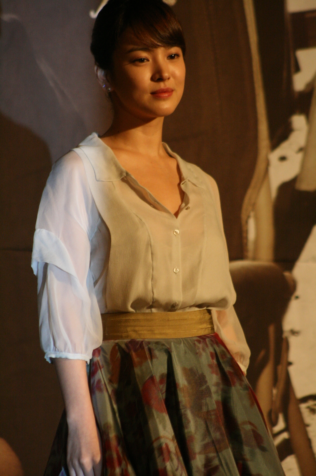 사진 147